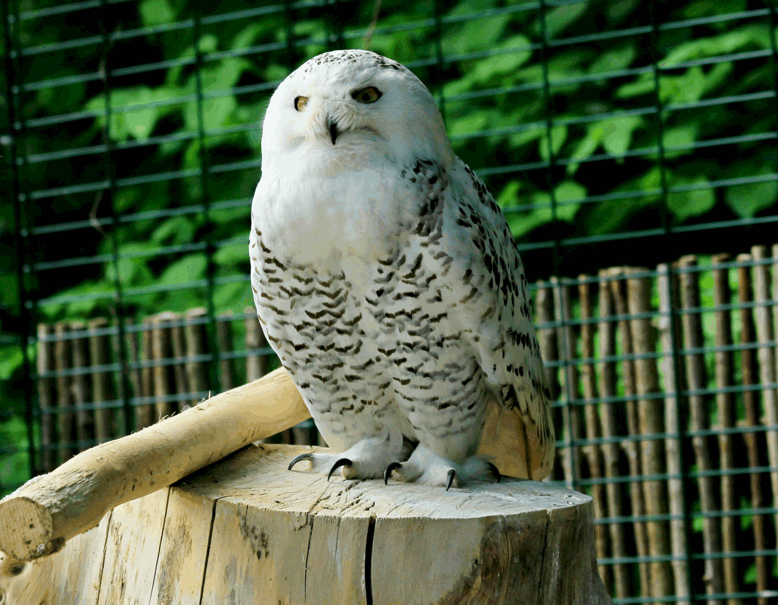 Baltoji pelėda Lietuvos zoologijos sode